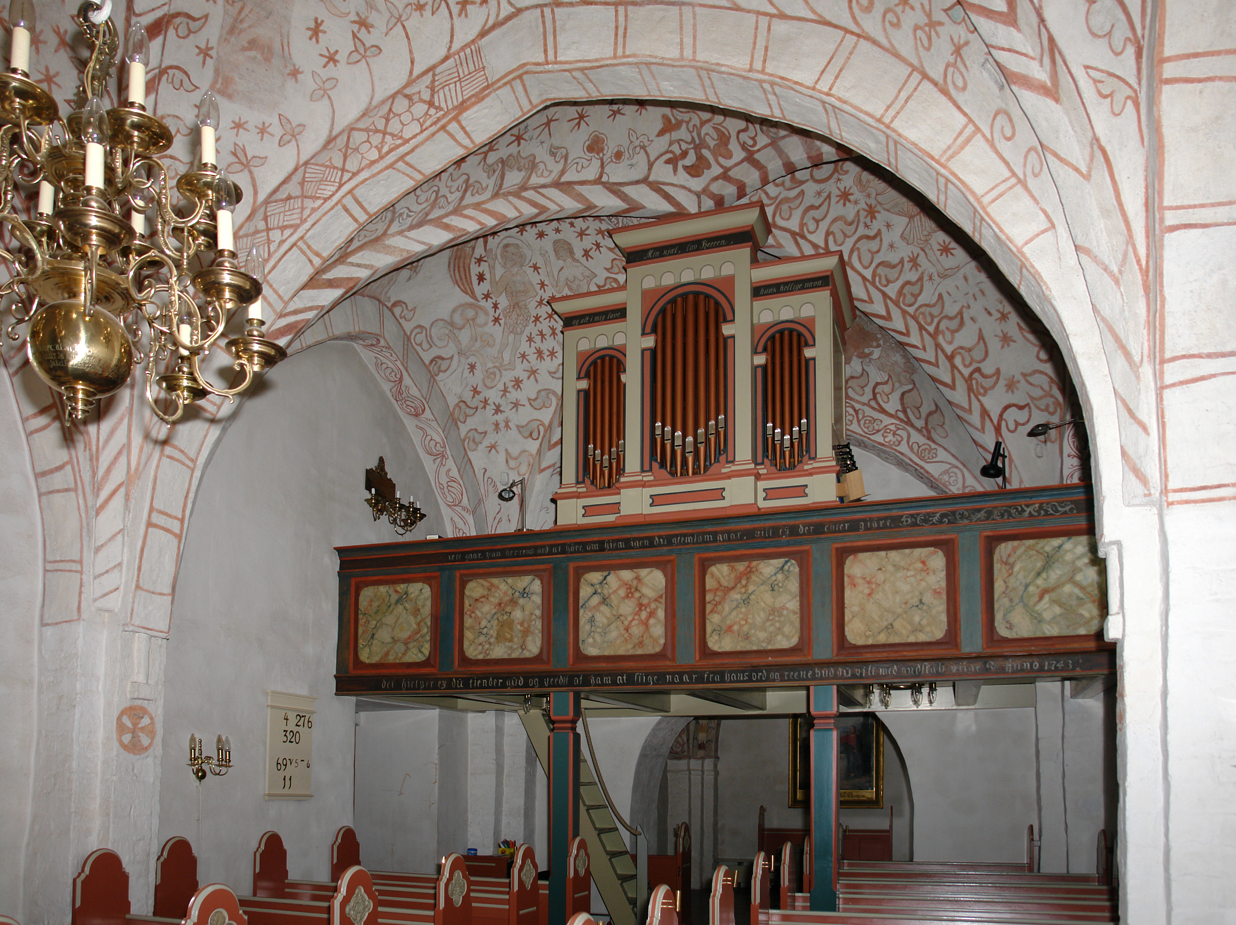 Kirche von Nødebo, Dänemark (Nord-Seeland).